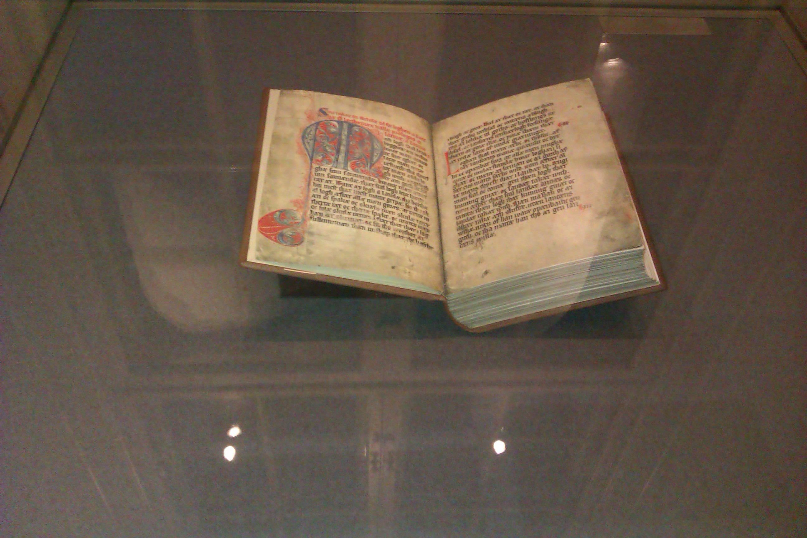 Fotografi af den kopi af Jyske Lov, der findes i Folketingets Vandrehal. Originalen findes i Rigsarkivet.